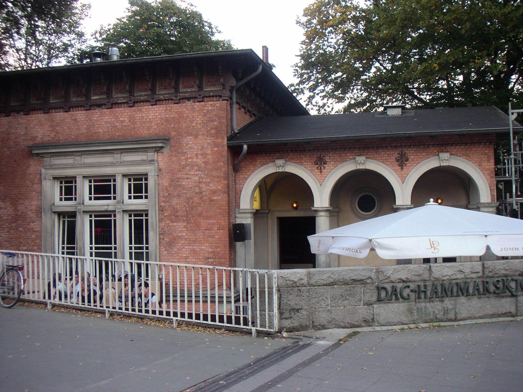 Ehemalige Polizeiwache Dammtordamm 2This is a photograph of an architectural monument.